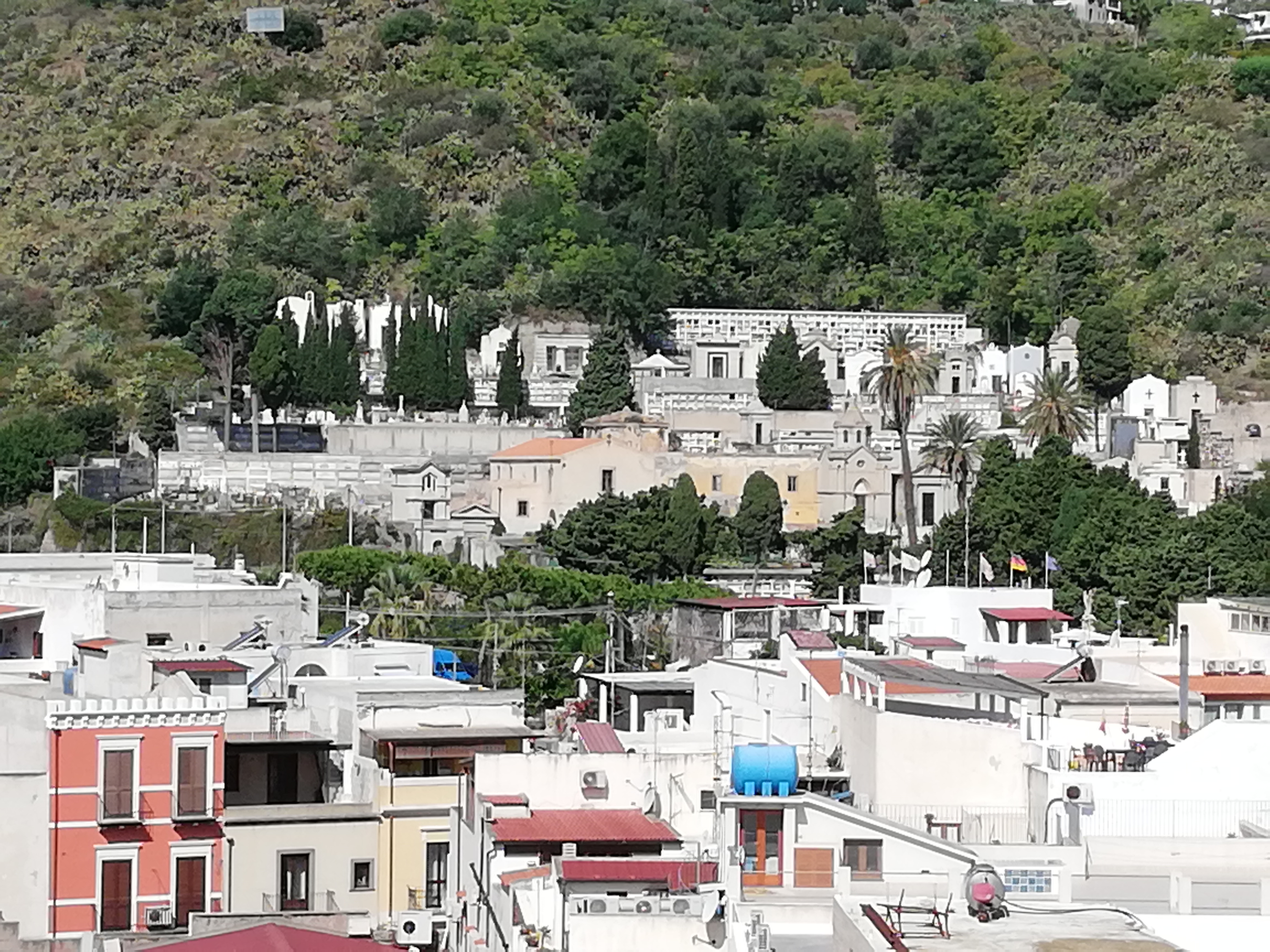 Chiesa di Santa Maria Assunta dell'Ordine dei frati minori cappuccini e cimitero cittadino di Lipari